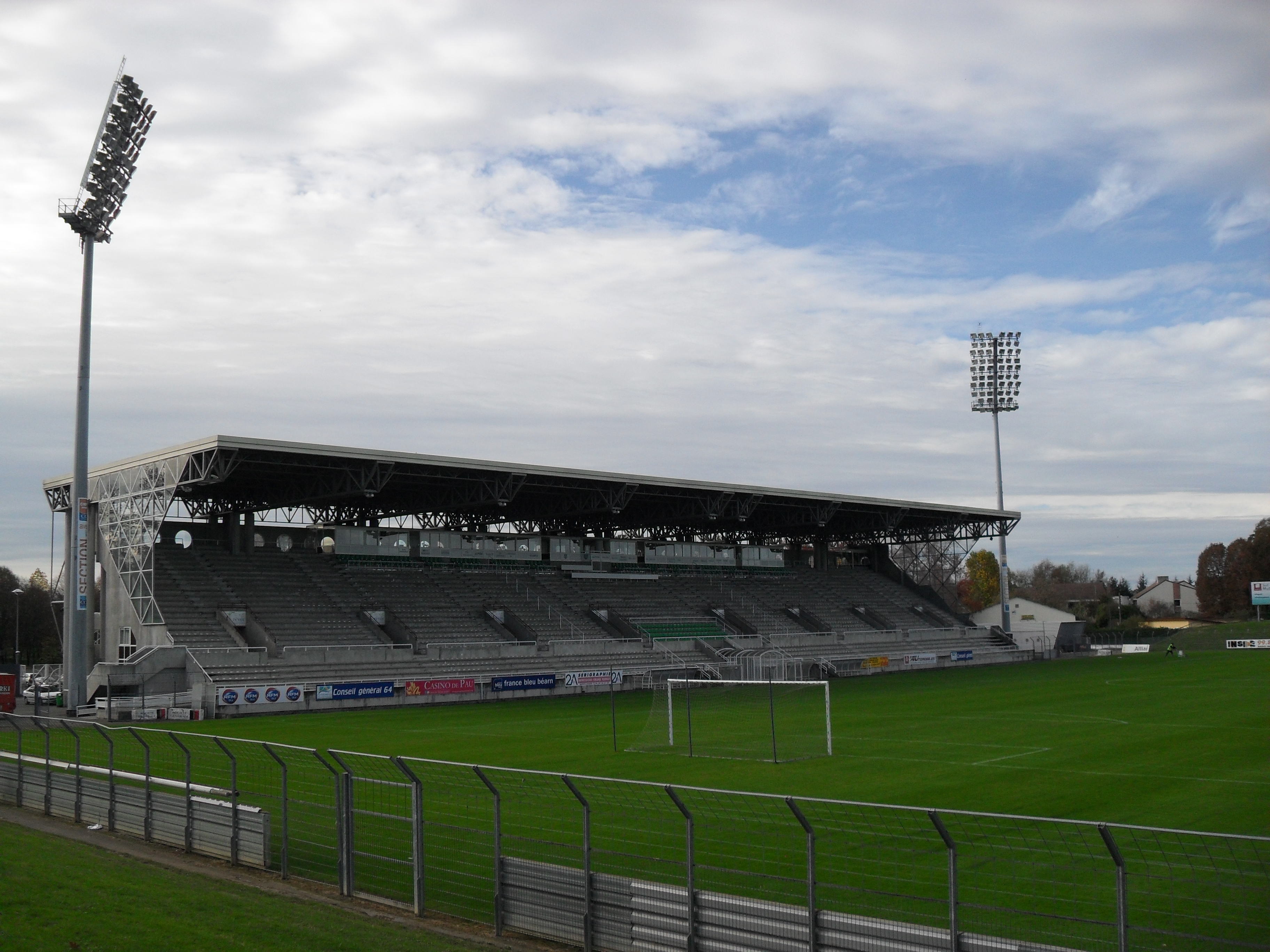 Tribune Honneur vue depuis la pelouse Sud